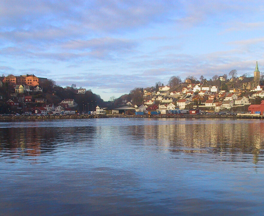 Strandstedet Barbu i Arendal.